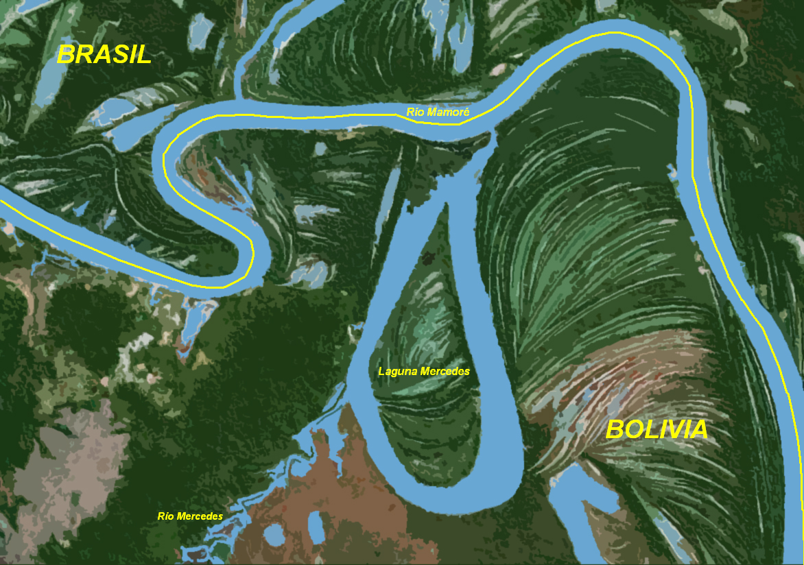 Mapa de la Laguna Mercedes ubicada en el departamento boliviano del Beni, en la frontera con Brasil